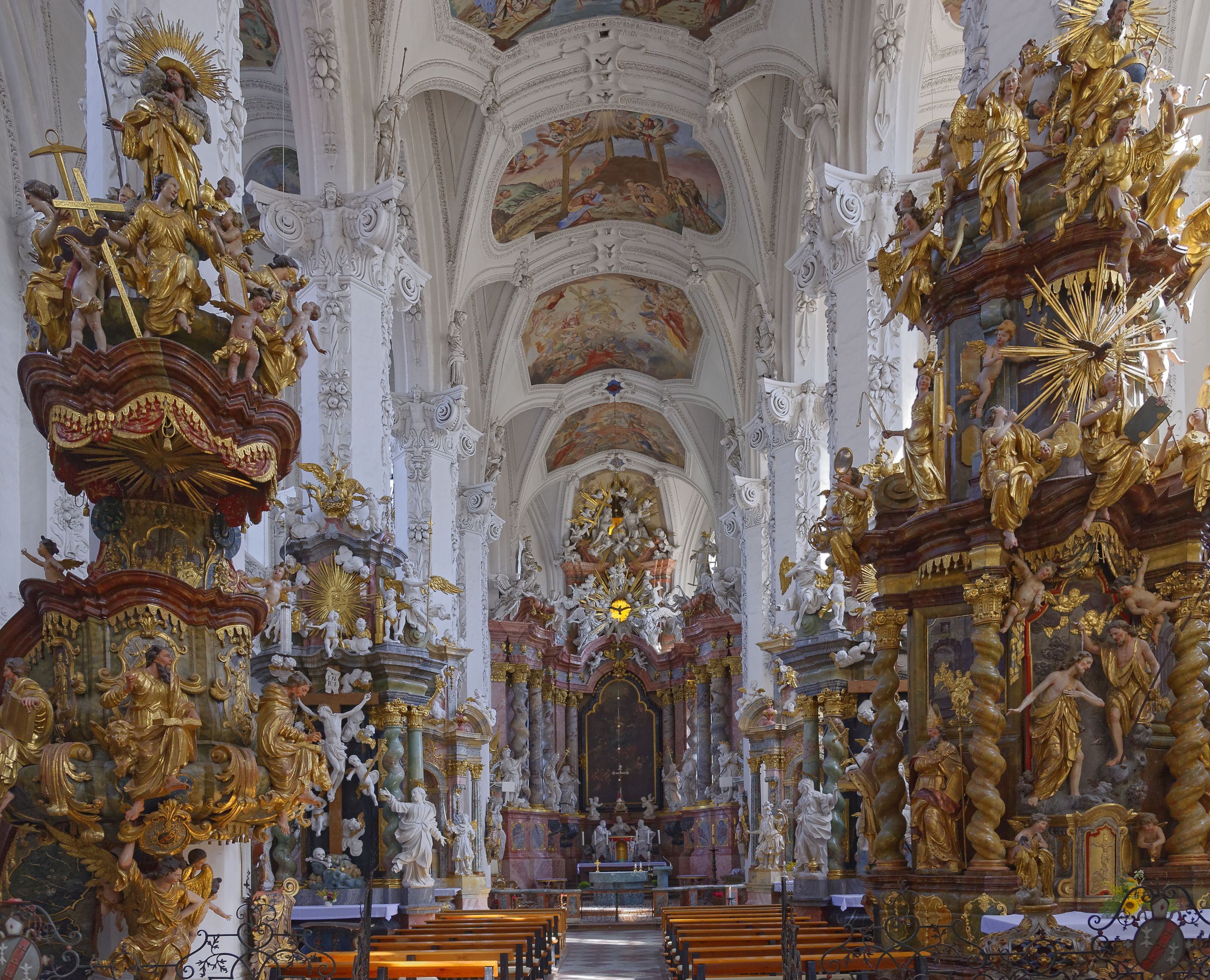 Kloster Neuzell - 2016